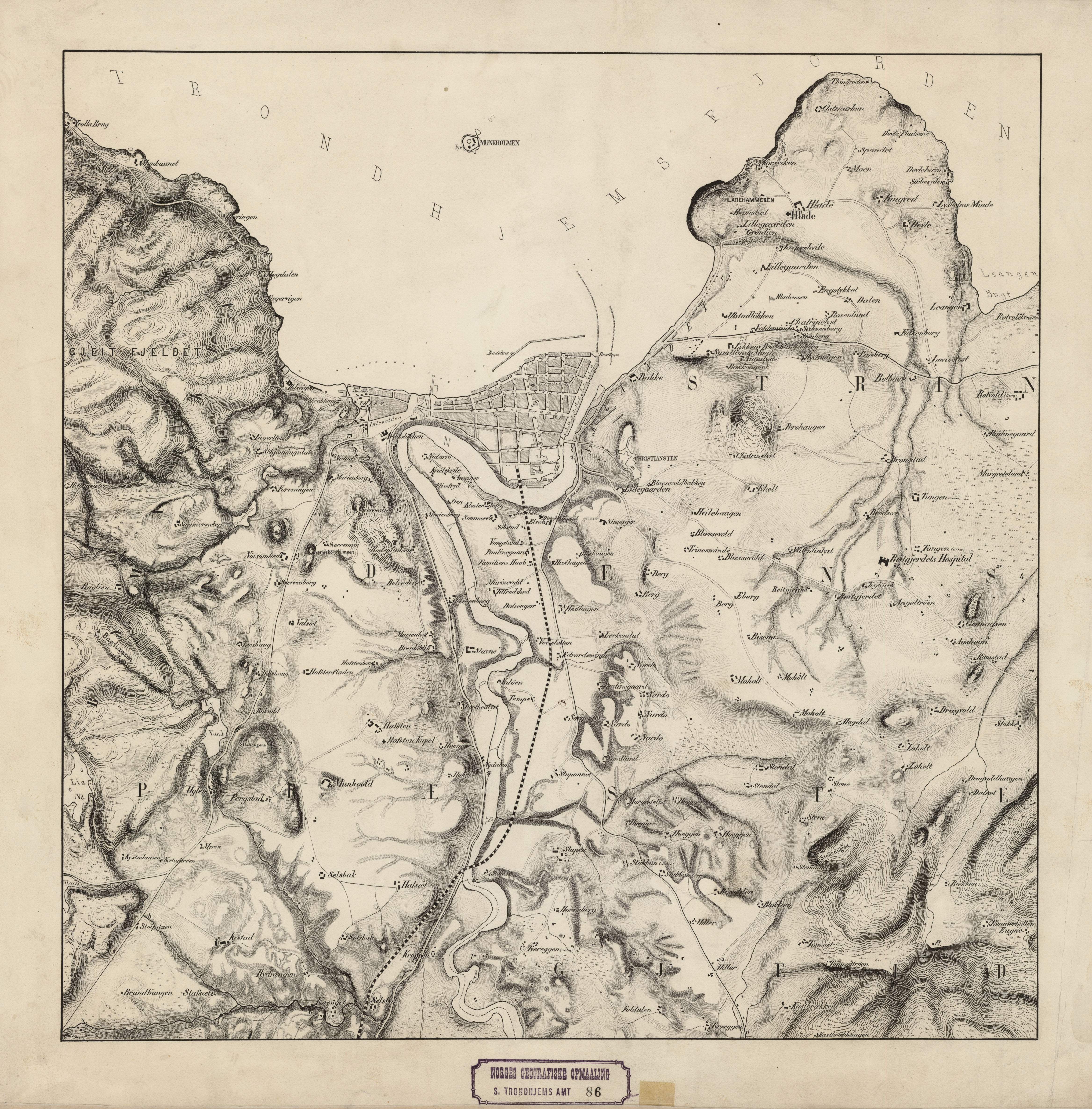 Kart over Trondhjem med nærmeste Omegn. Optaget for Norges geografiske Opmaaling af Lt.ne. E.Lund og R.Ziegler. Kopi af Ltn. Solem. (U.T.)